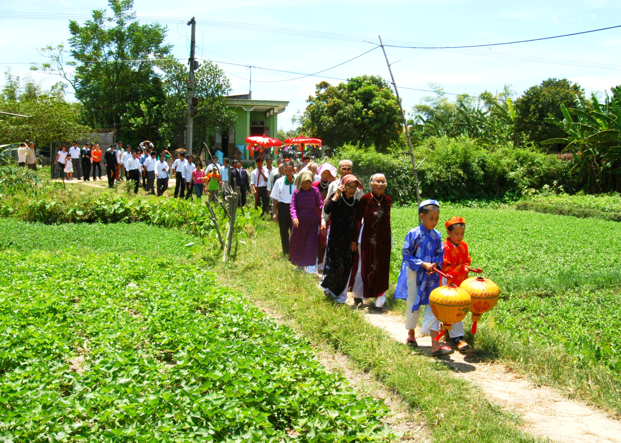 Đám cưới trên đường quê Licensing Thể loại: Lễ cưới